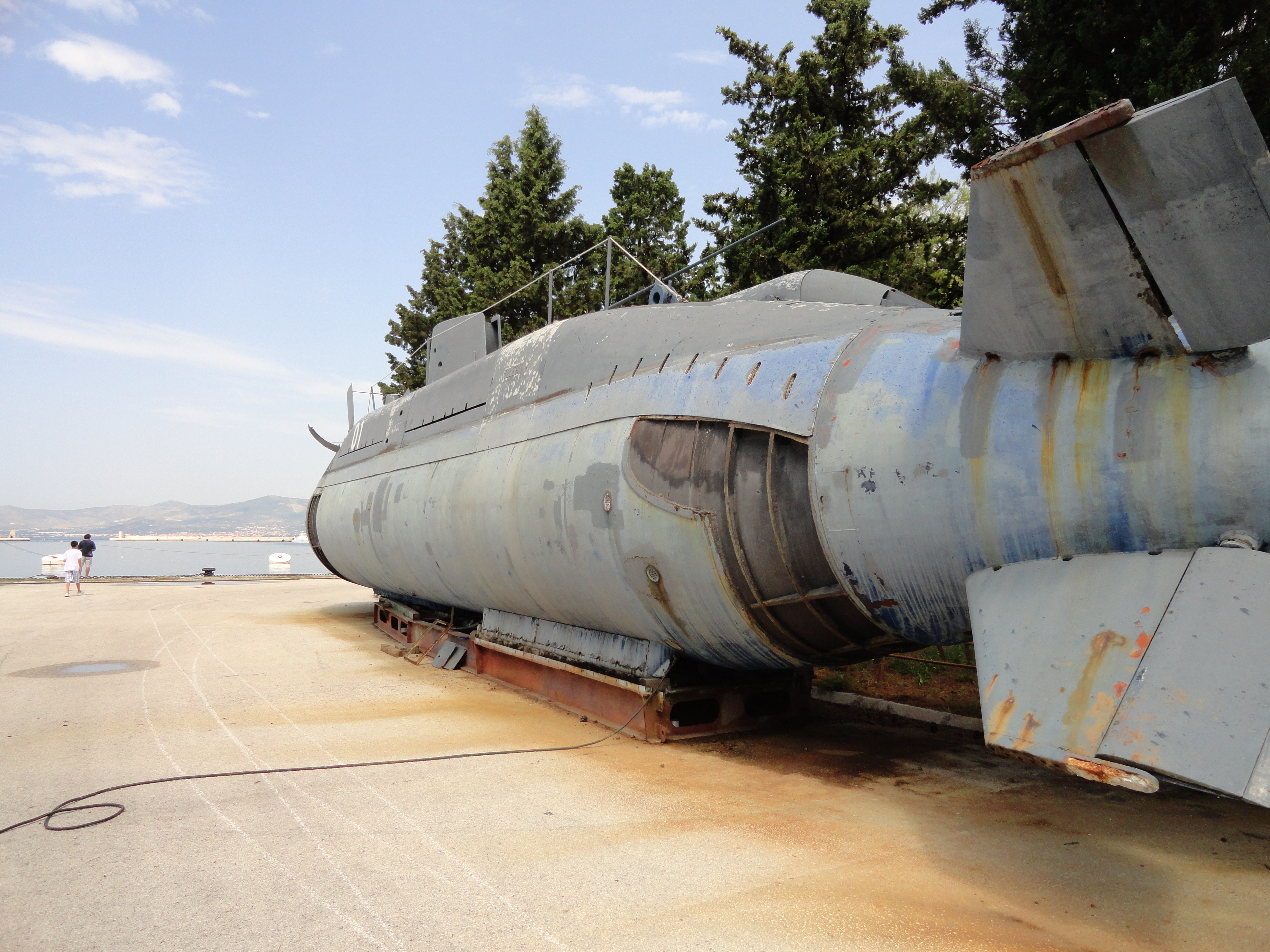 P-01 Velebit u Lori.